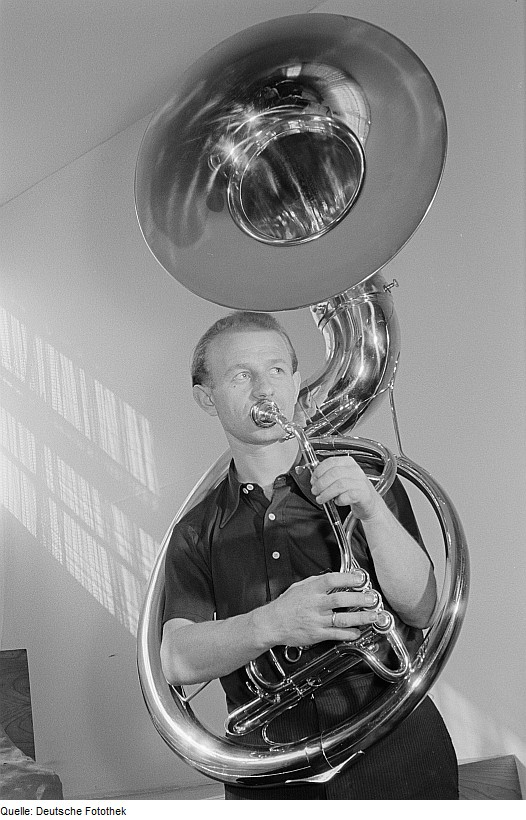 Original image description from the Deutsche Fotothek Ein Mann spielt ein Sousaphon auf der Leipziger Herbstmesse 1954